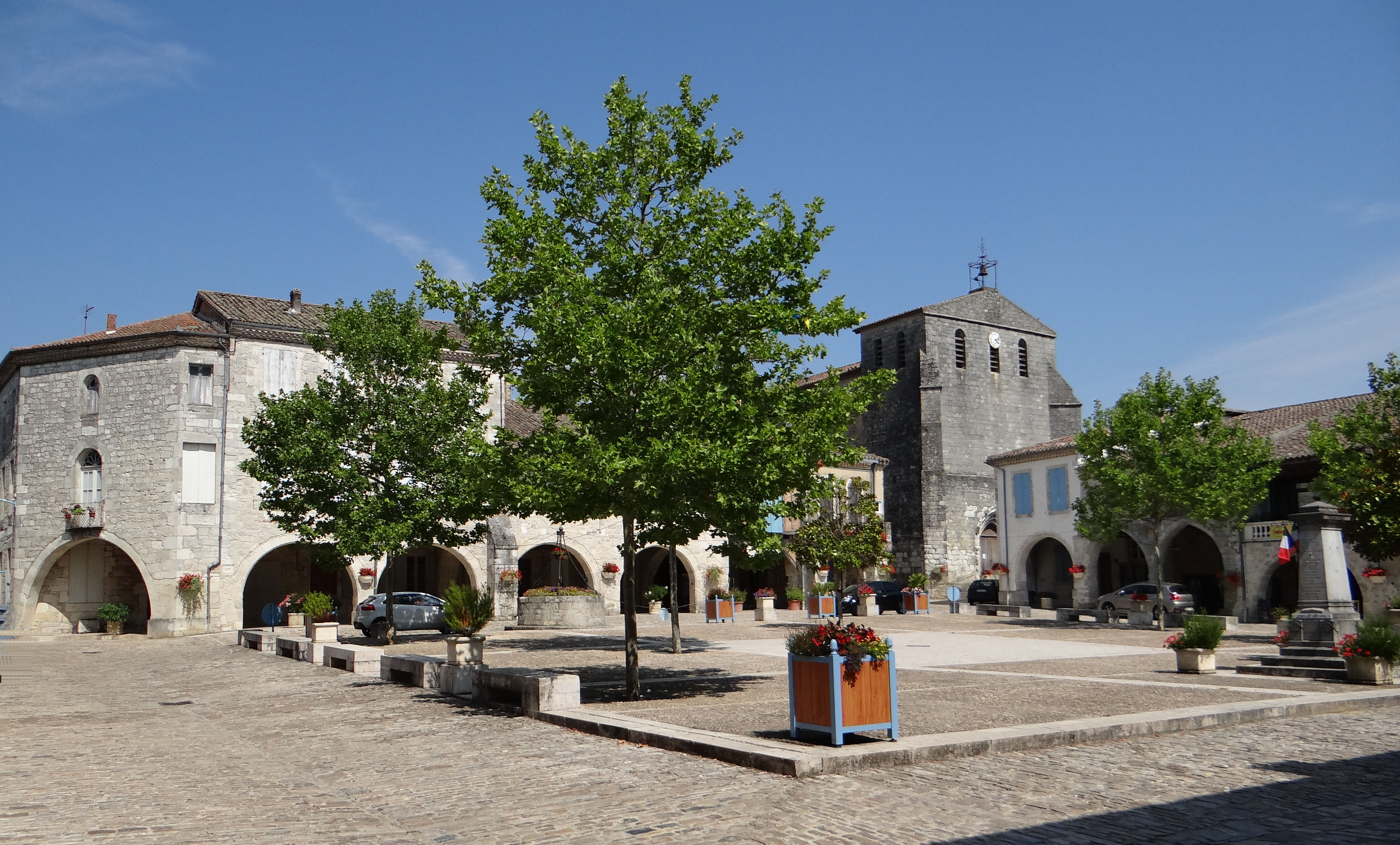 Castelsagrat - Maisons entourant la place de la Liberté